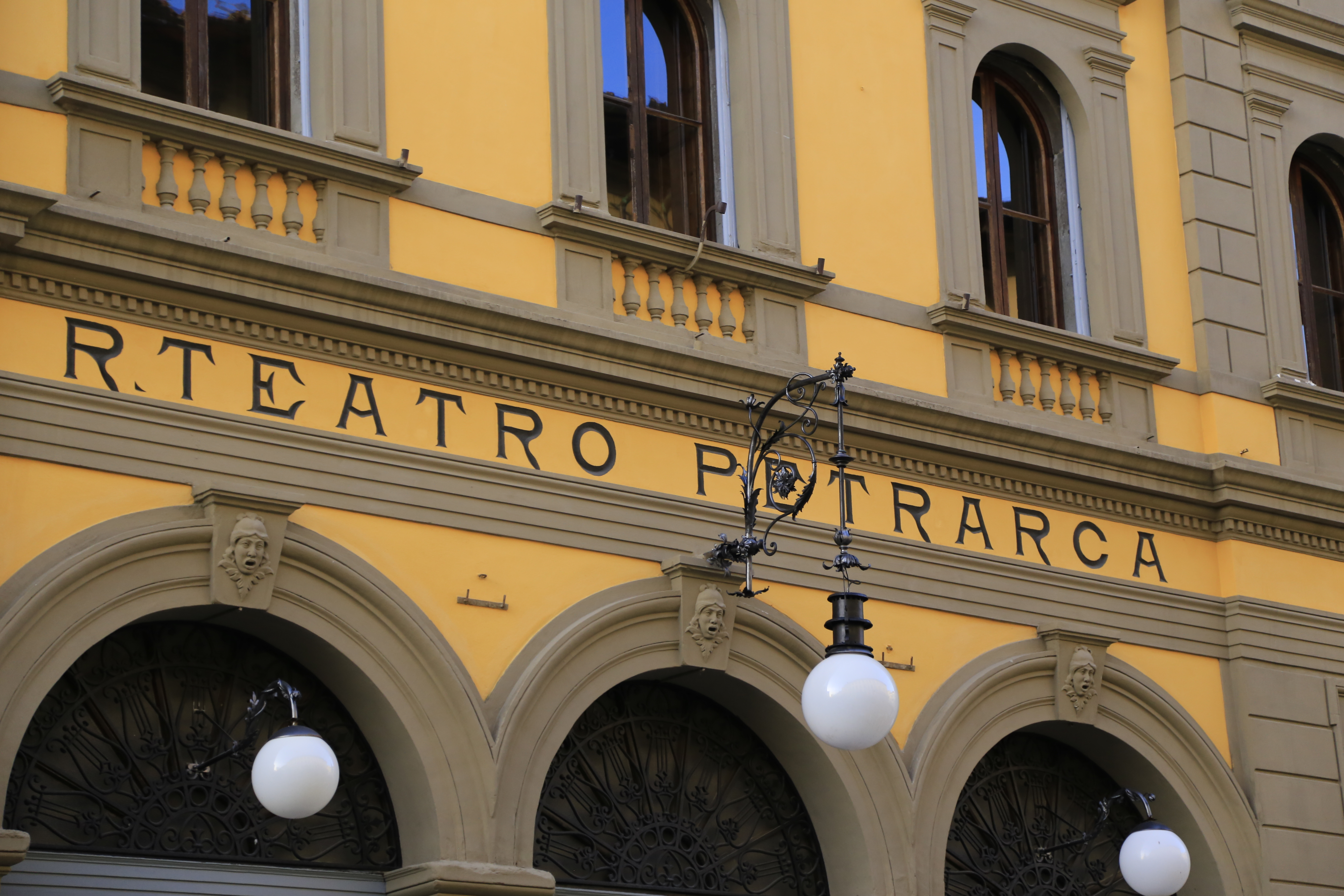 Teatro Petrarca ad Arezzo